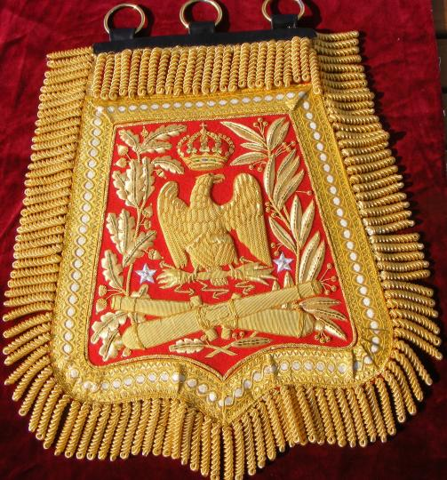 sabretache ayant appartenu au général desvaux de saint maurice